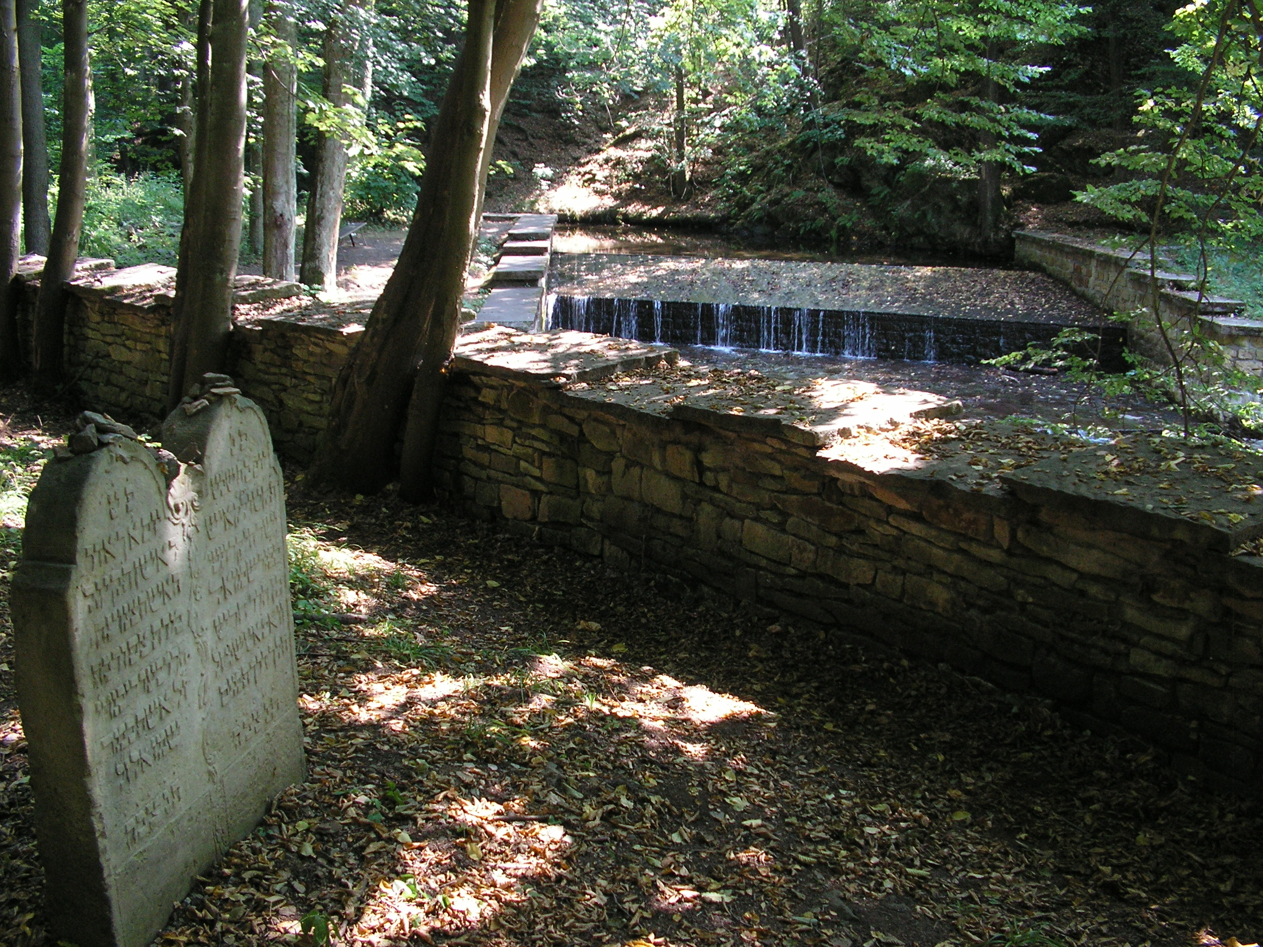 Pohled ze židovského hřbitova u Podbřezí na řeku Dědinu (Zlatý potok)